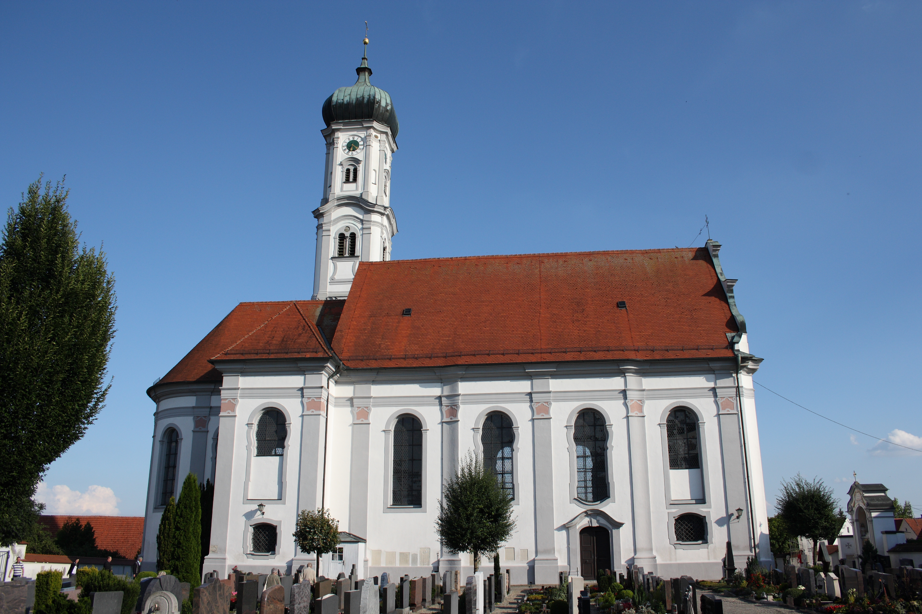 Katholische Pfarrkirche St. Peter in Tapfheim im Landkreis Donau-Ries (Bayern)